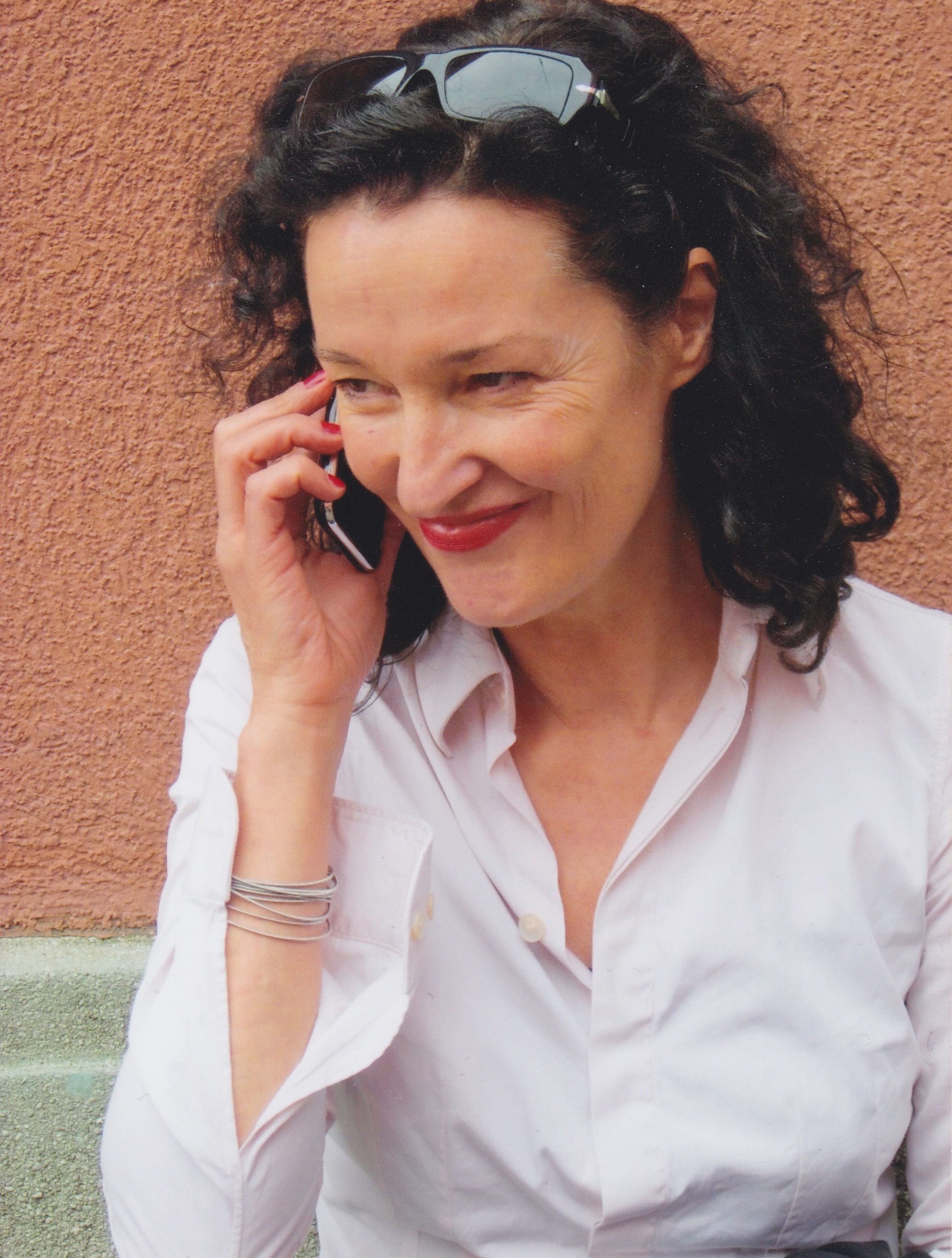 Portrait Barbara Wien, Foto: Maggie Zaiss